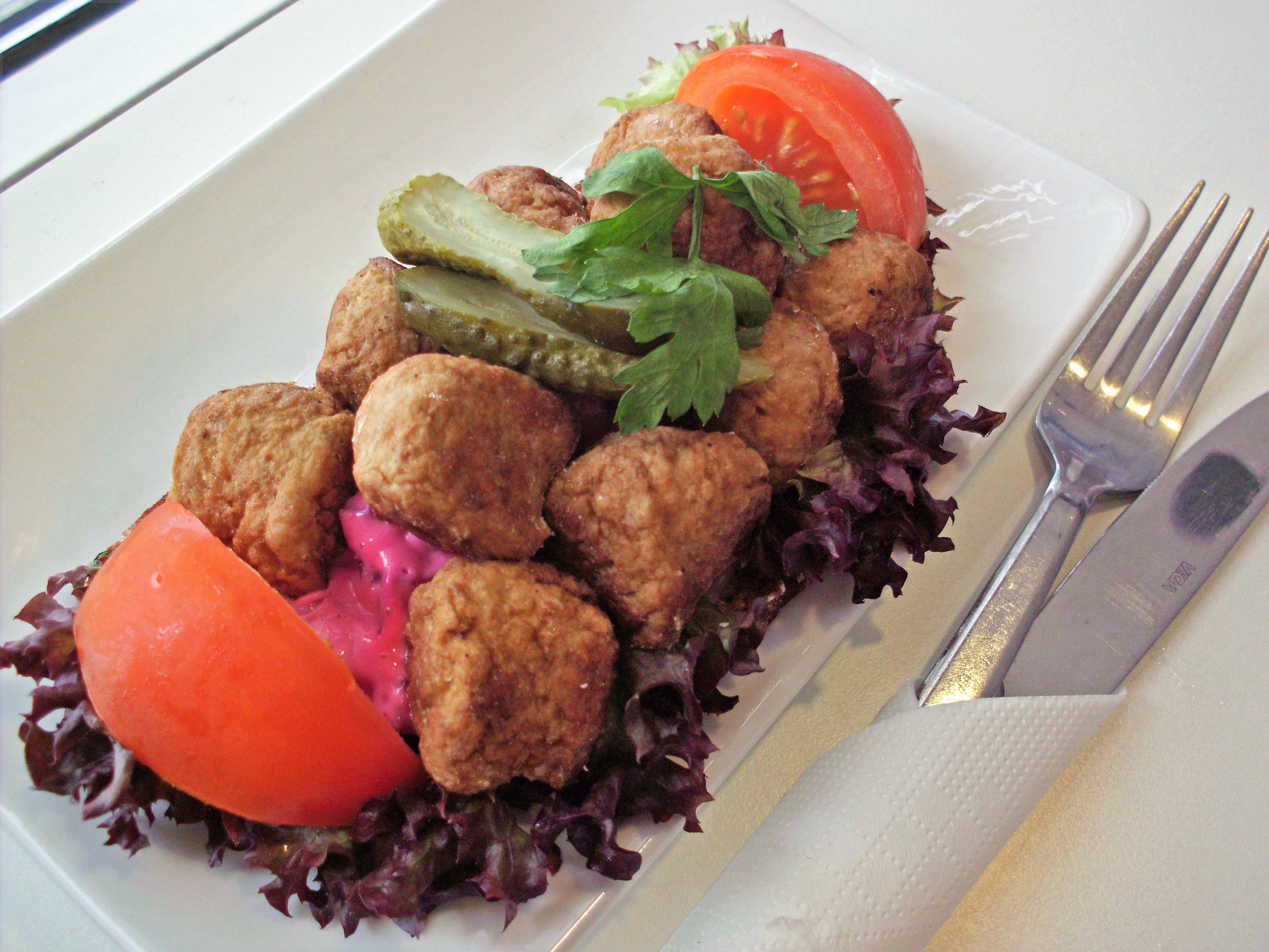 Köttbullesmörgås (Smörgås mit Köttbullar), bestehend aus: Brot, belegt mit Lollo rossa und Köttbullar, garniert mit Tomate, Gewürzgurke und Blattpetersilie.